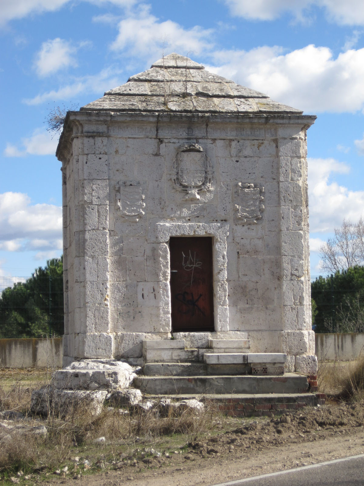 Arca Real número 1 de la conducción que, construida a finales del siglo XVI, transportaba agua a Valladolid (España).